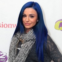 Cher Loyd 2013